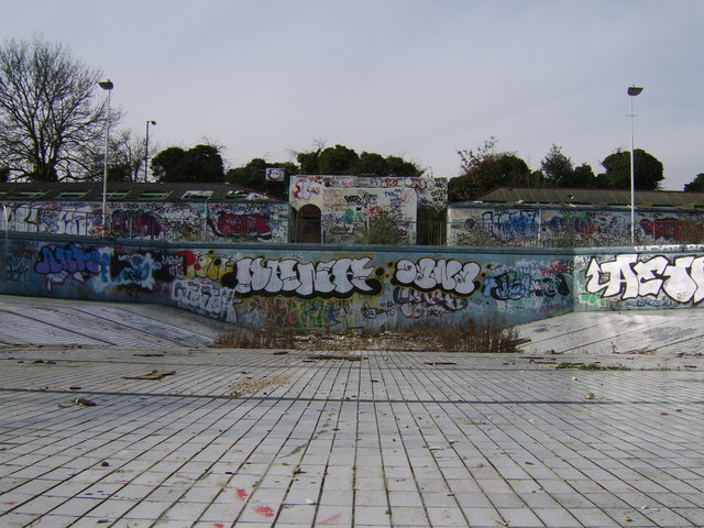 Uxbridge Lido (2007)